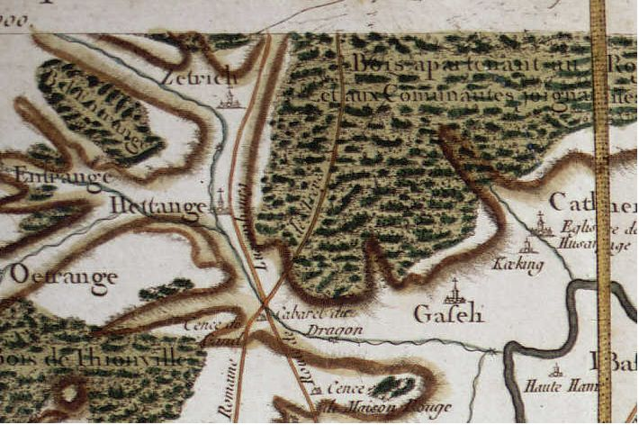 Hettange-Grande et environs - Carte de Cassini